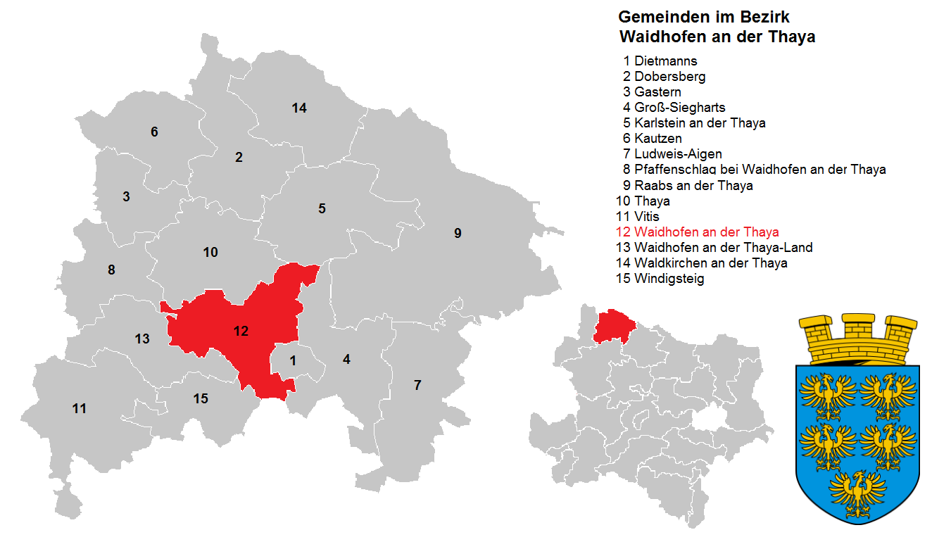 Bezirk Waidhofen an der Thaya